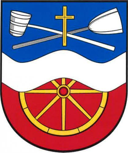 Velké Březno znak